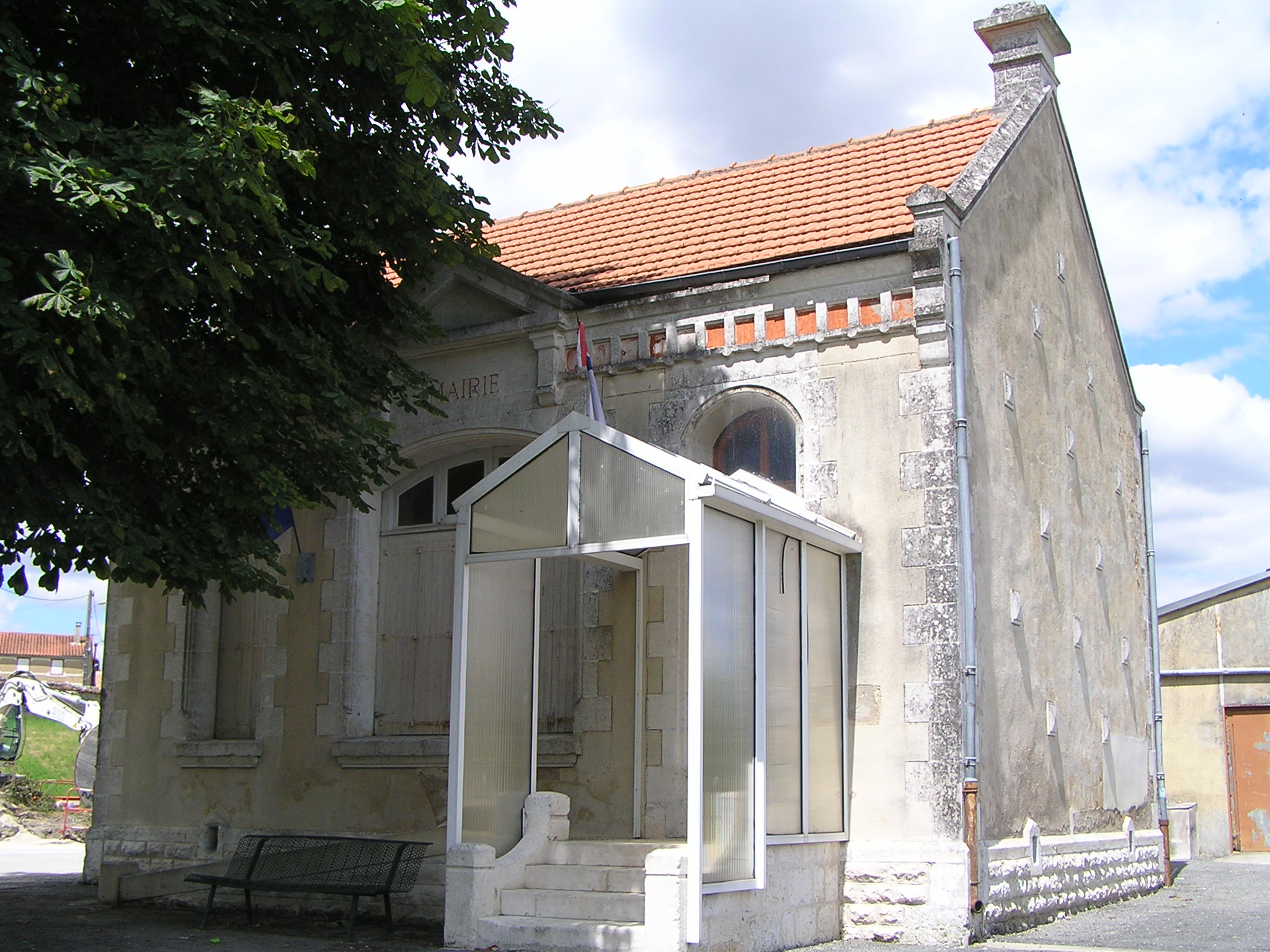 mairie d'Anville